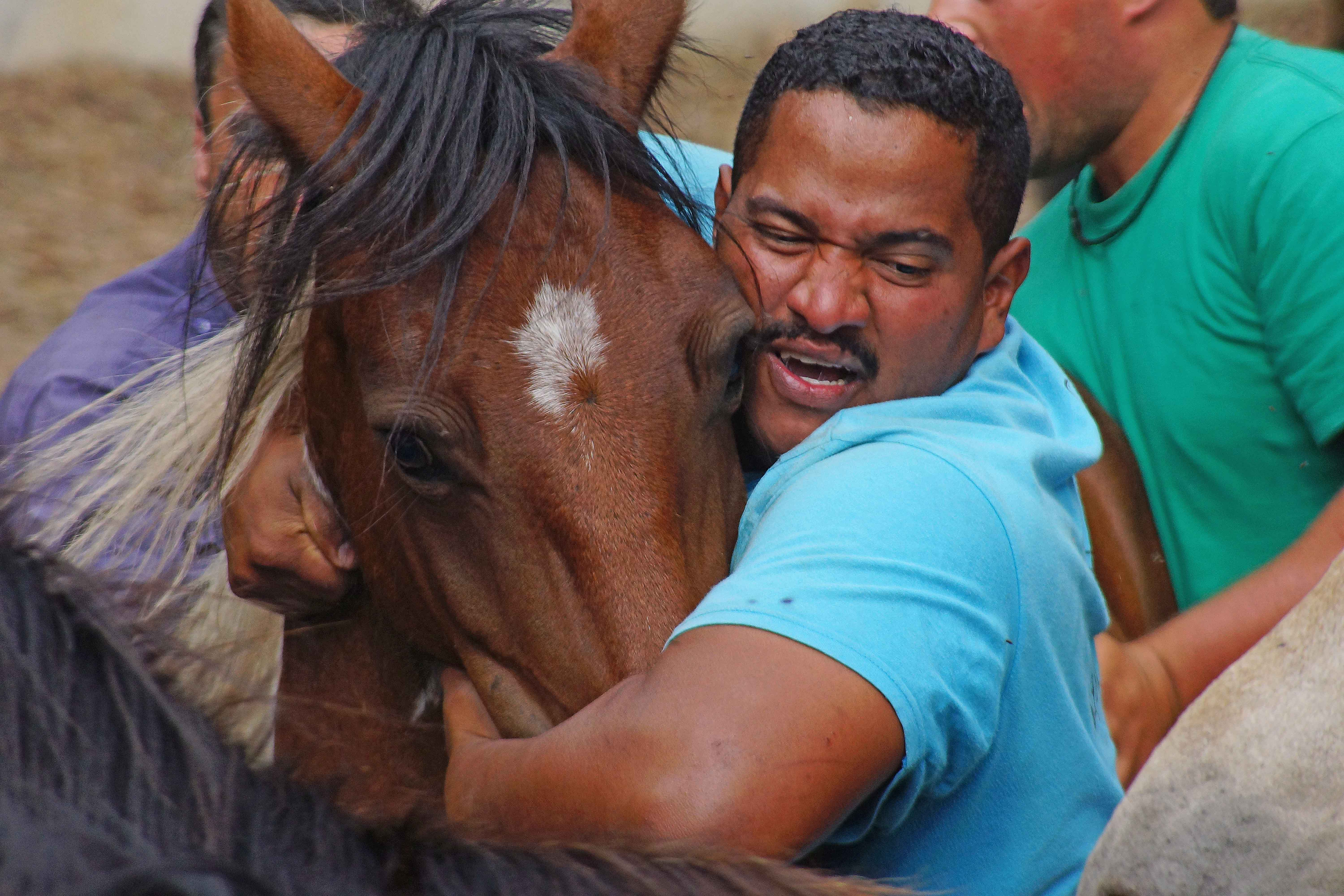 Cotobade, Pontevedra, Galicia, España, Spain